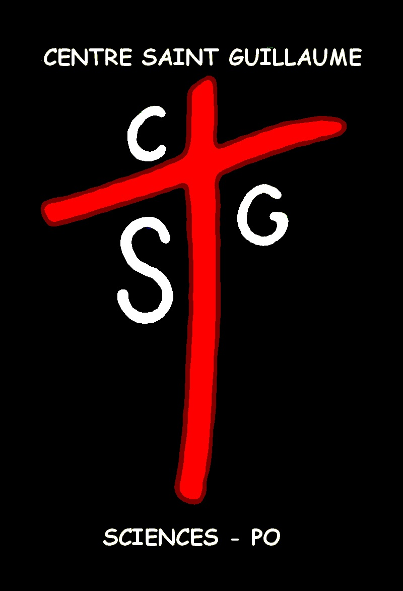 Logo de l'aumônerie